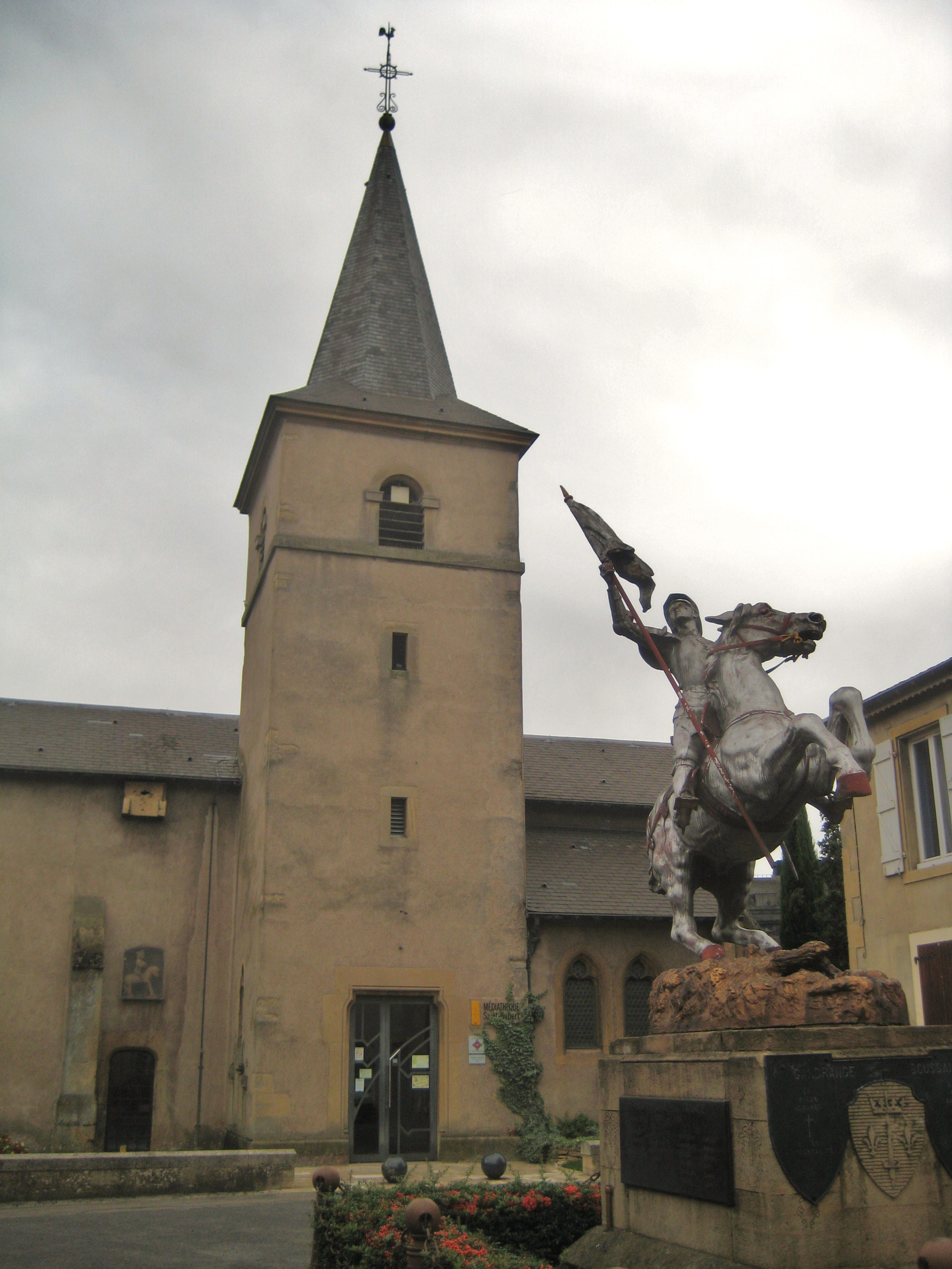 Description